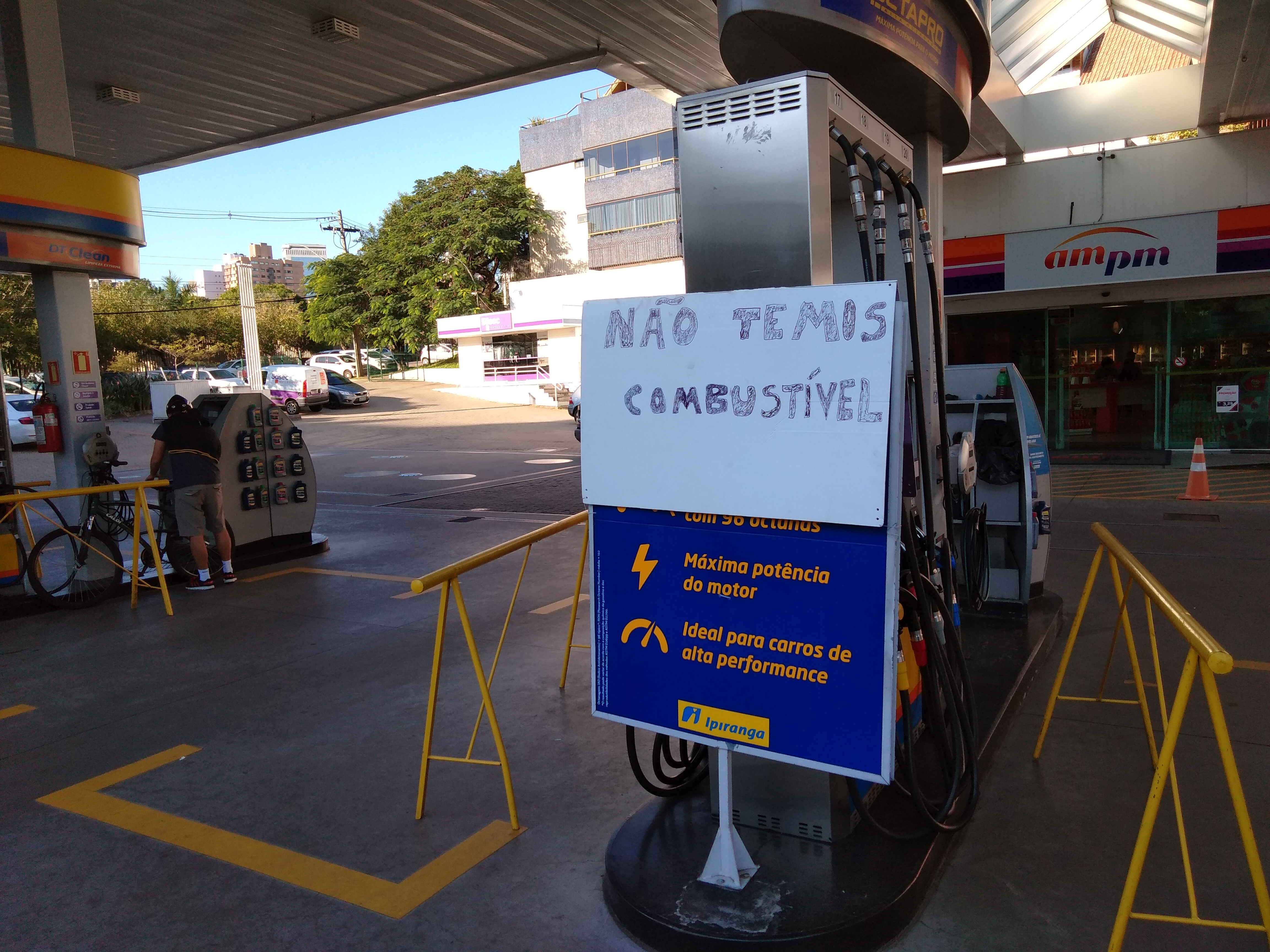 Cavaletes e avisos sobre a falta de combustível em posto em Porto Alegre dia 26 de maio de 2018